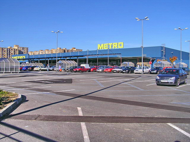 METRO Kosice